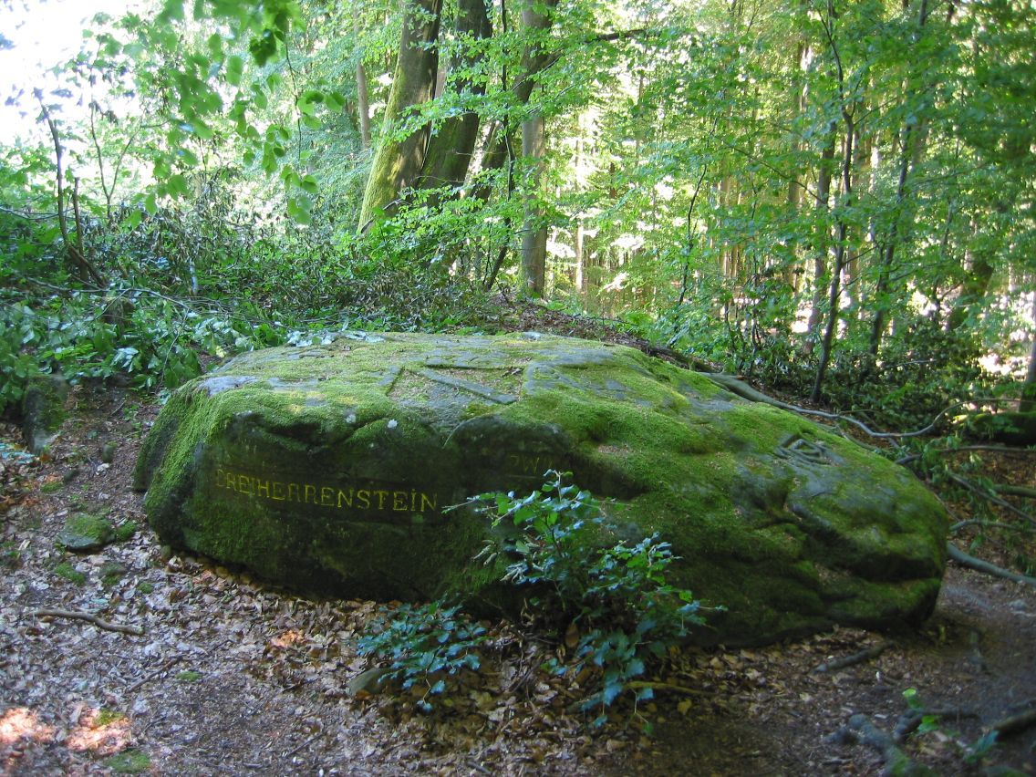 Ritterstein Nummer 57, Dreiherrenstein